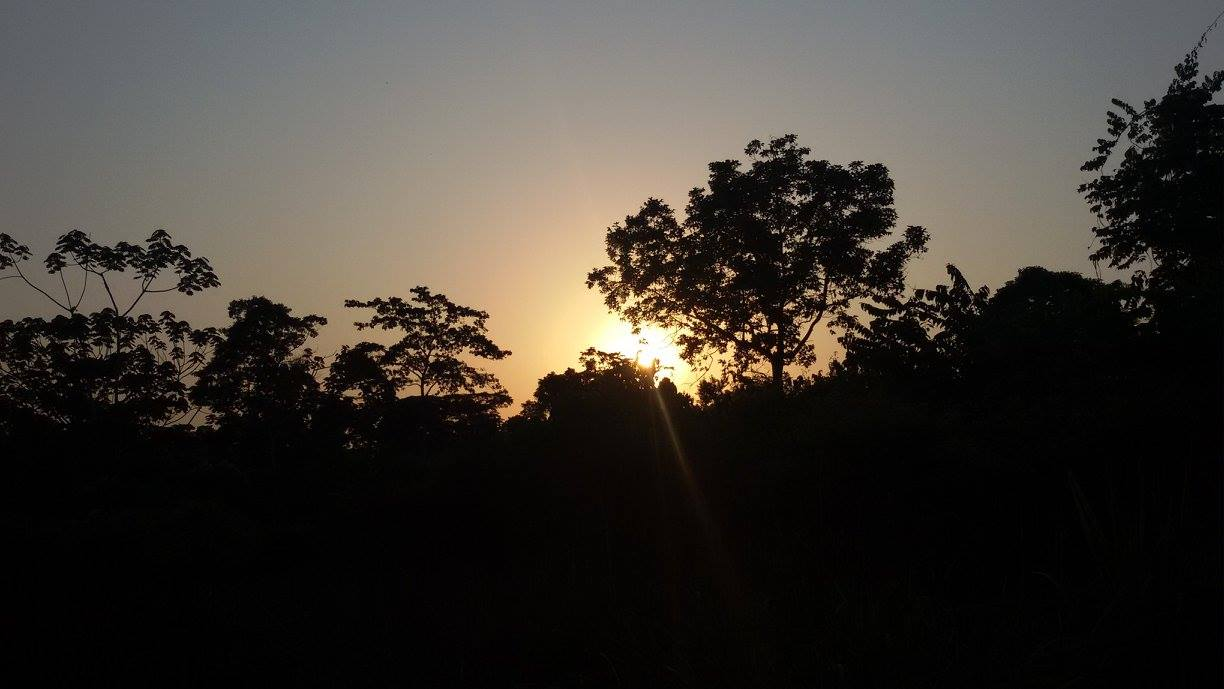 Couché du soleil dans le Dja . Créée en 1950, la Réserve de faune du Dja fait partie intégrante des forêts denses humides qui constituent le bassin du Congo. Ce vaste ensemble constitue l'une des forêts humides d'Afrique les plus vastes et les mieux protégées : 90 % de sa superficie restant inviolée.